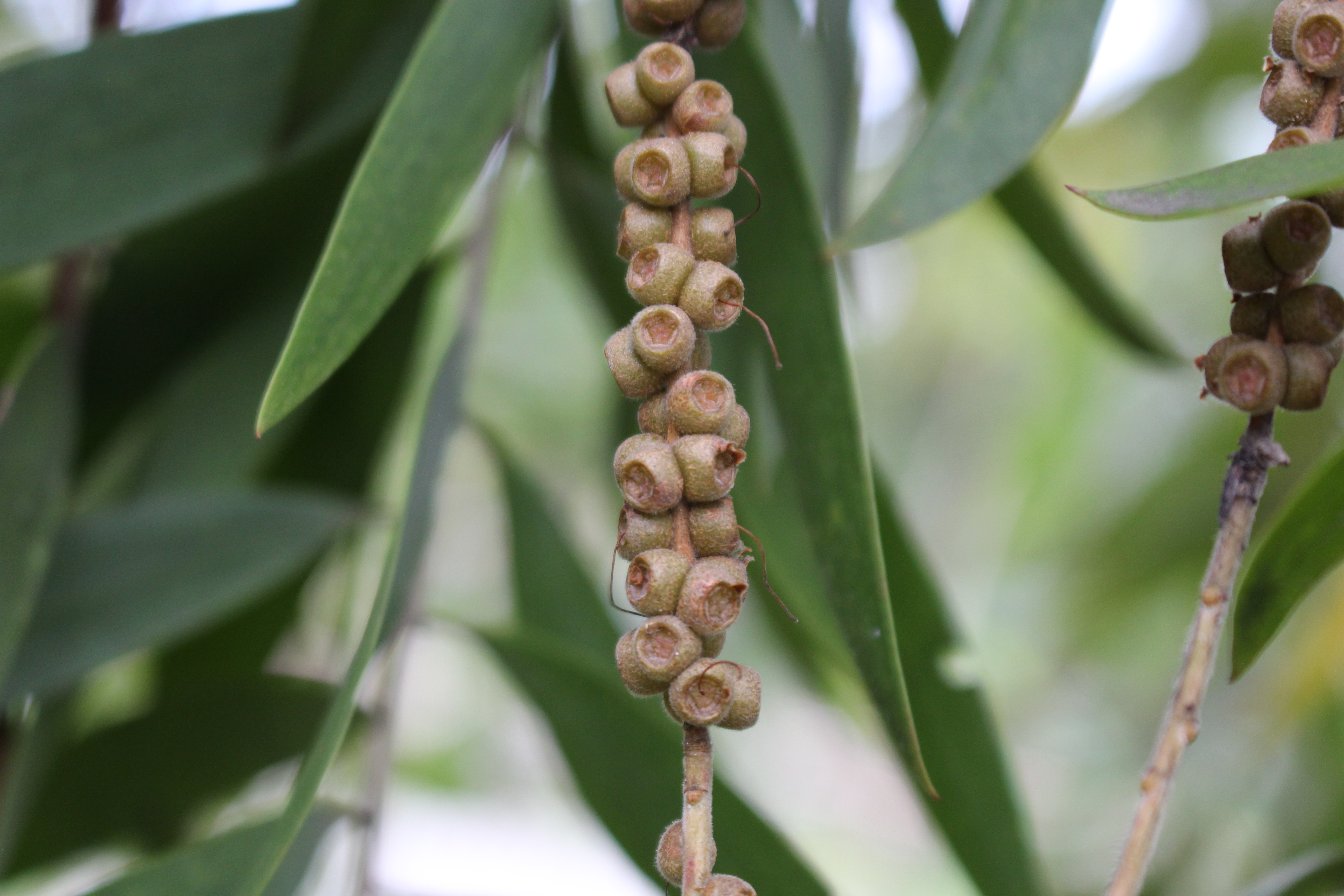 Buah kayu putih (Melaleuca leucadendra)